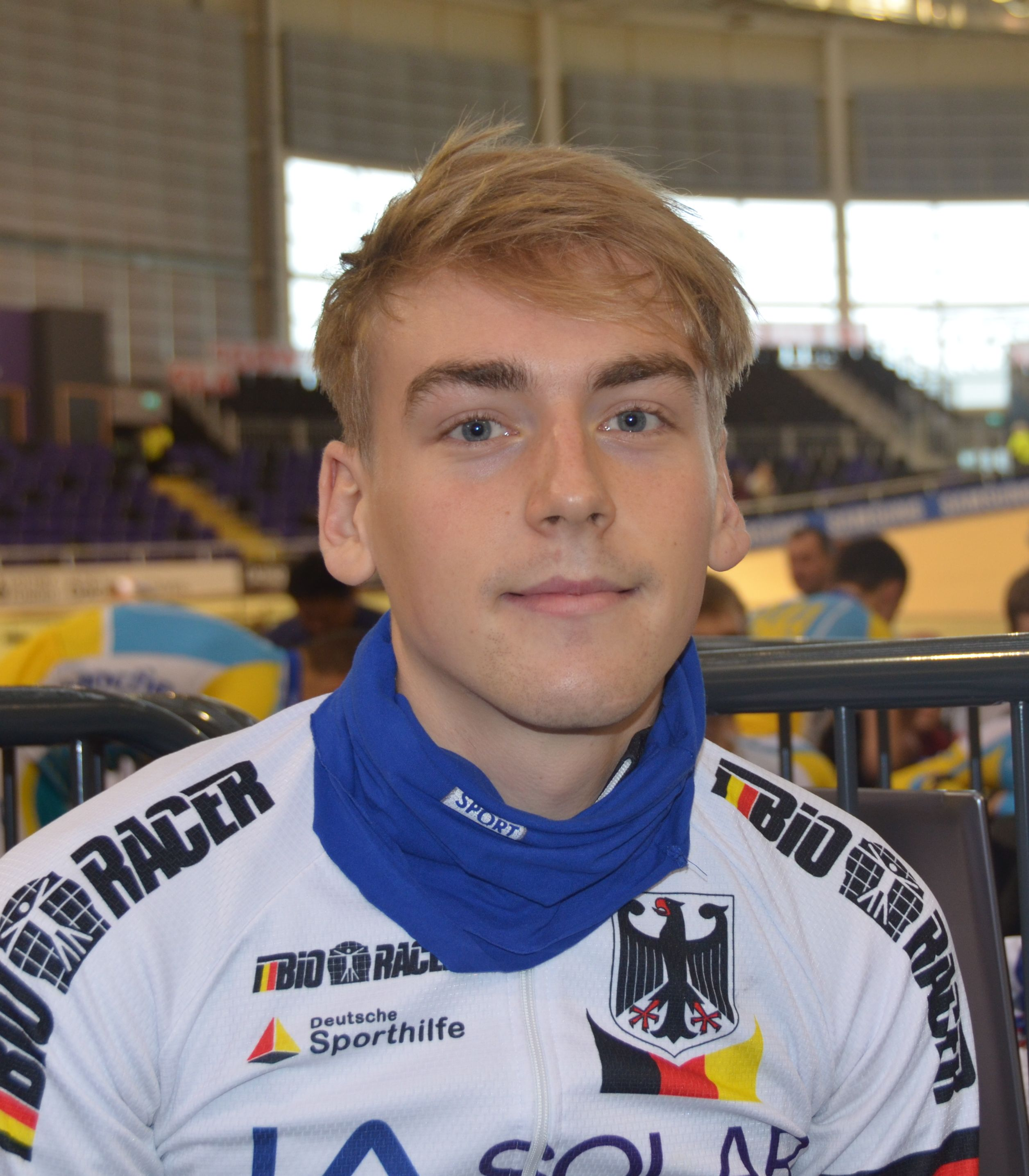 Theo Reinhardt, deutscher Radsportler